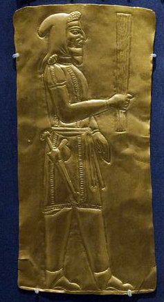 Colección de placas votivas de oro pertenecientes al Tesoro de Oxus en el Museo Británico. Londres.